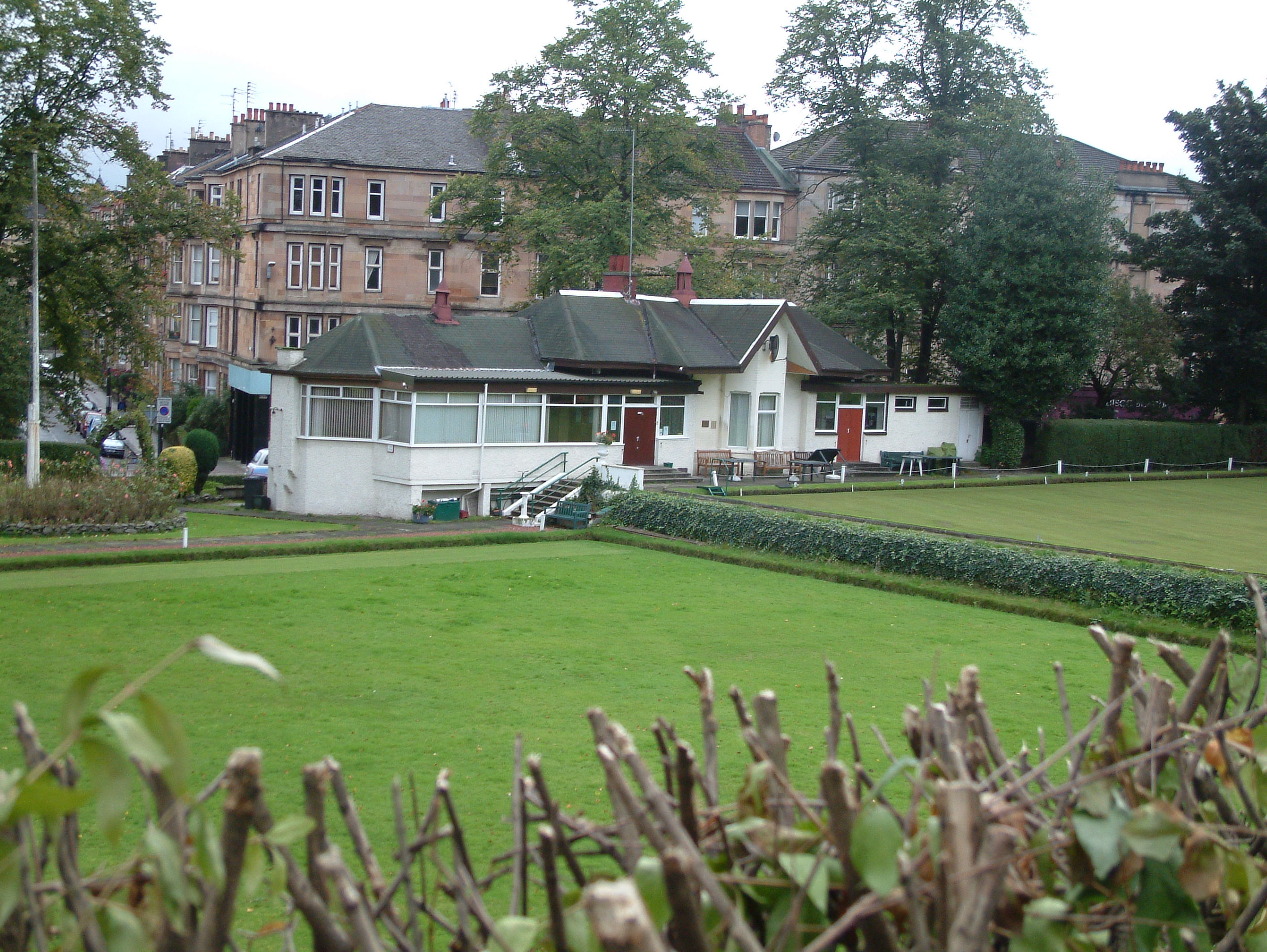 foto SB 2006